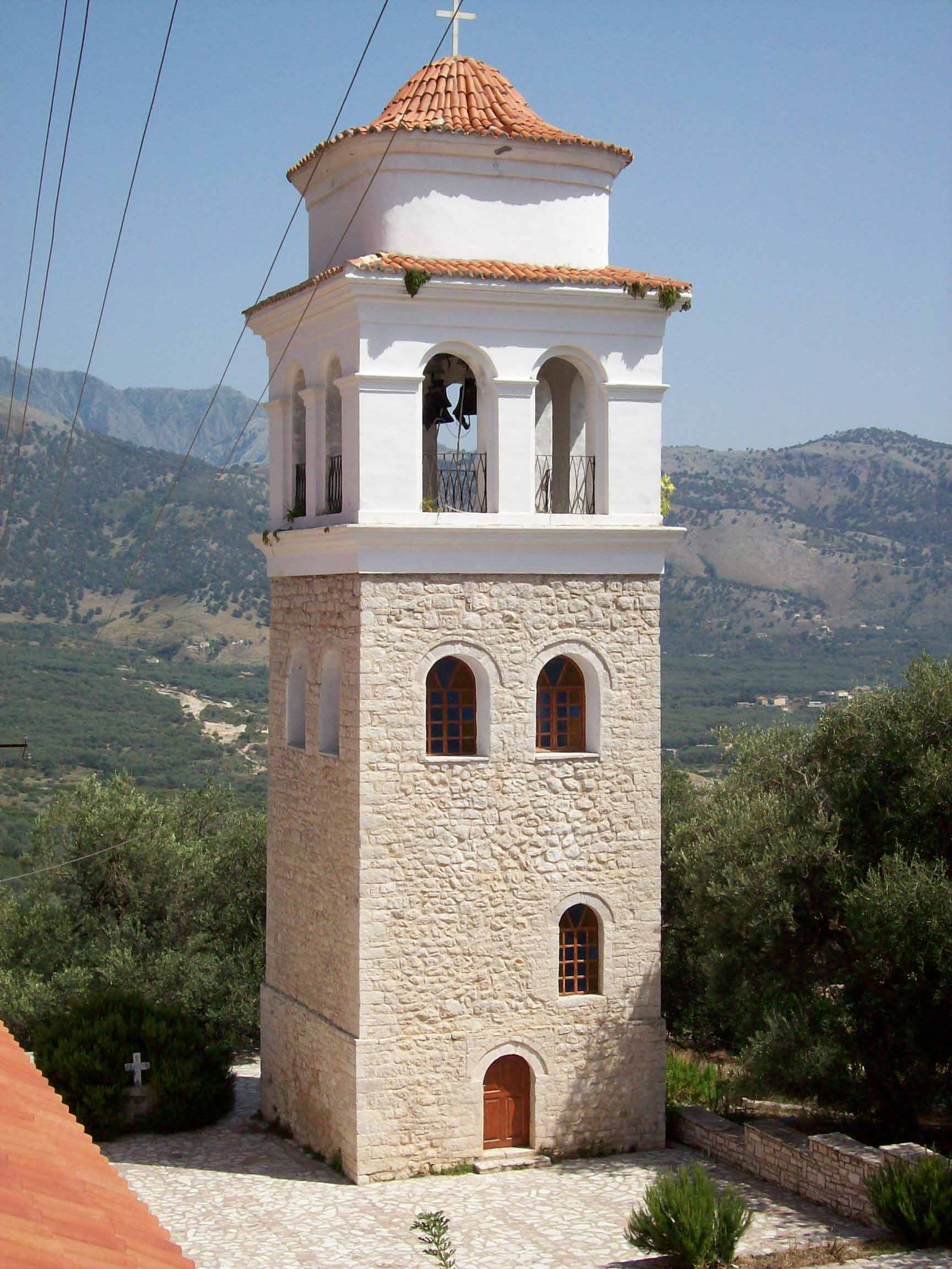 Glockenturm der orthodoxen Kirche in Himara, (Albanien).